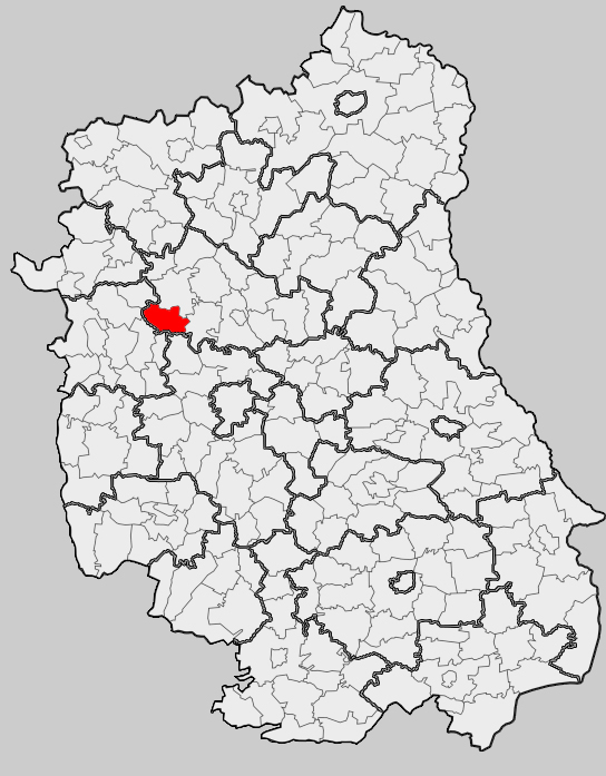 Map of gmina Abramów, Lubartów county, Lublin voivodship Mapa gminy Abramów, powiat lubartowski, województwo lubelskie